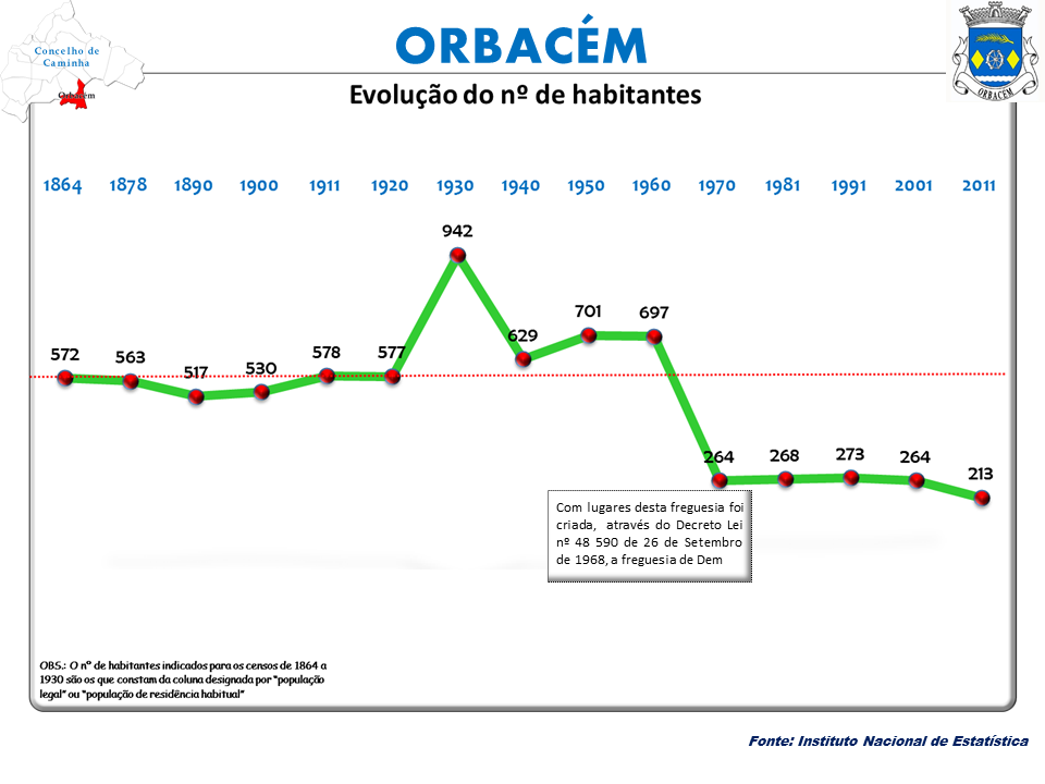 Censos 1864/2011